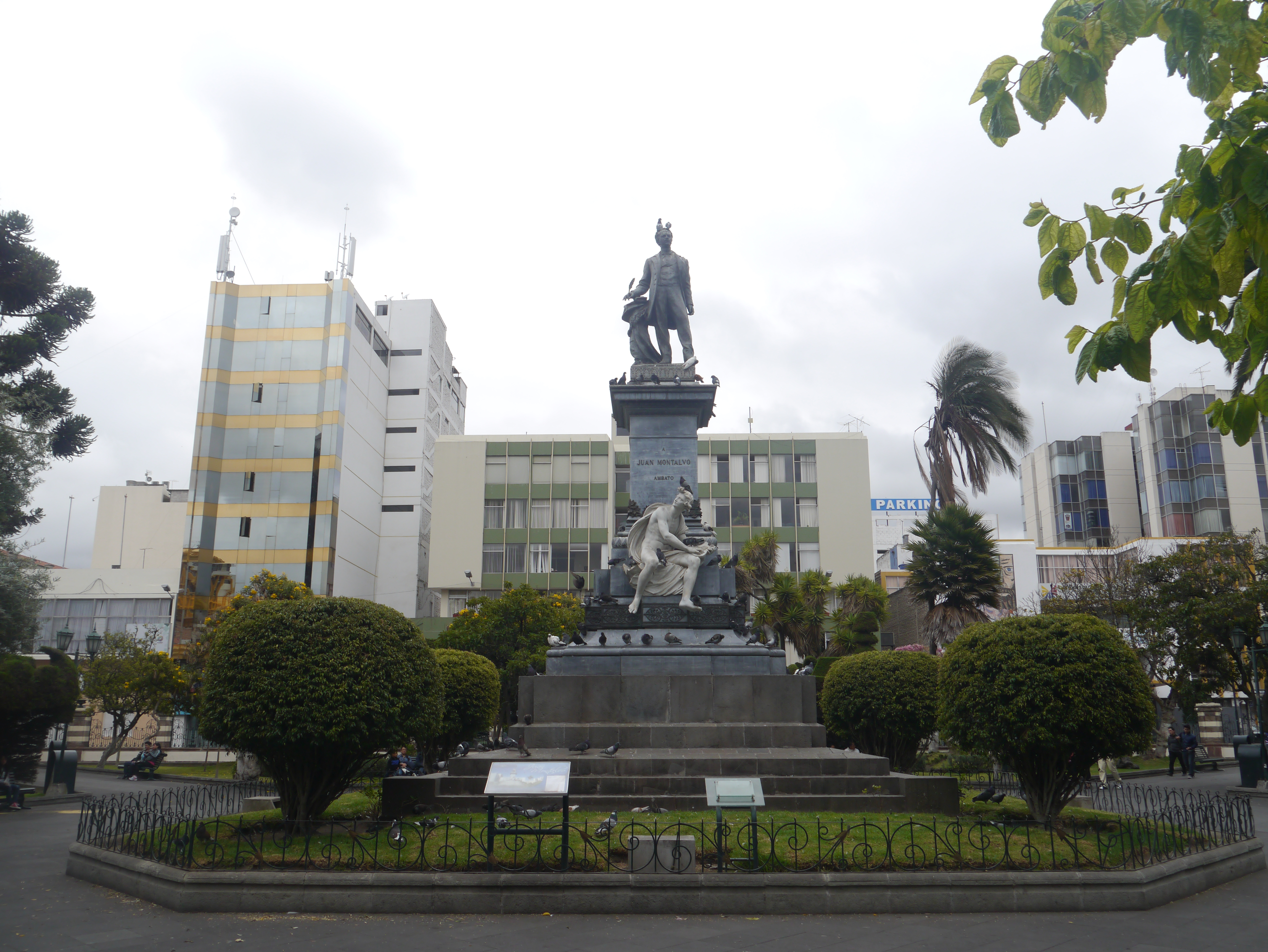 Monumento a Juan Montalvo en el parque homónimo en Ambato, Ecuador